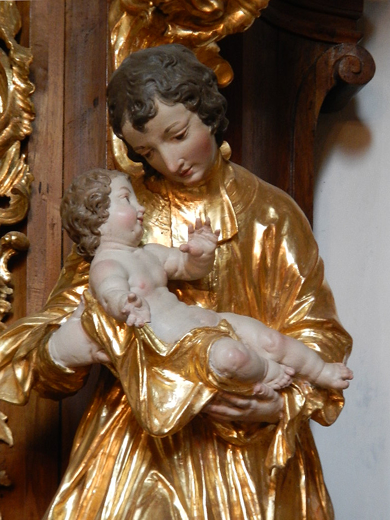 Statue des Heiligen Hermann Joseph von Steinfeld in der Pfarrkirche Stainz, Steiermark, Österreich